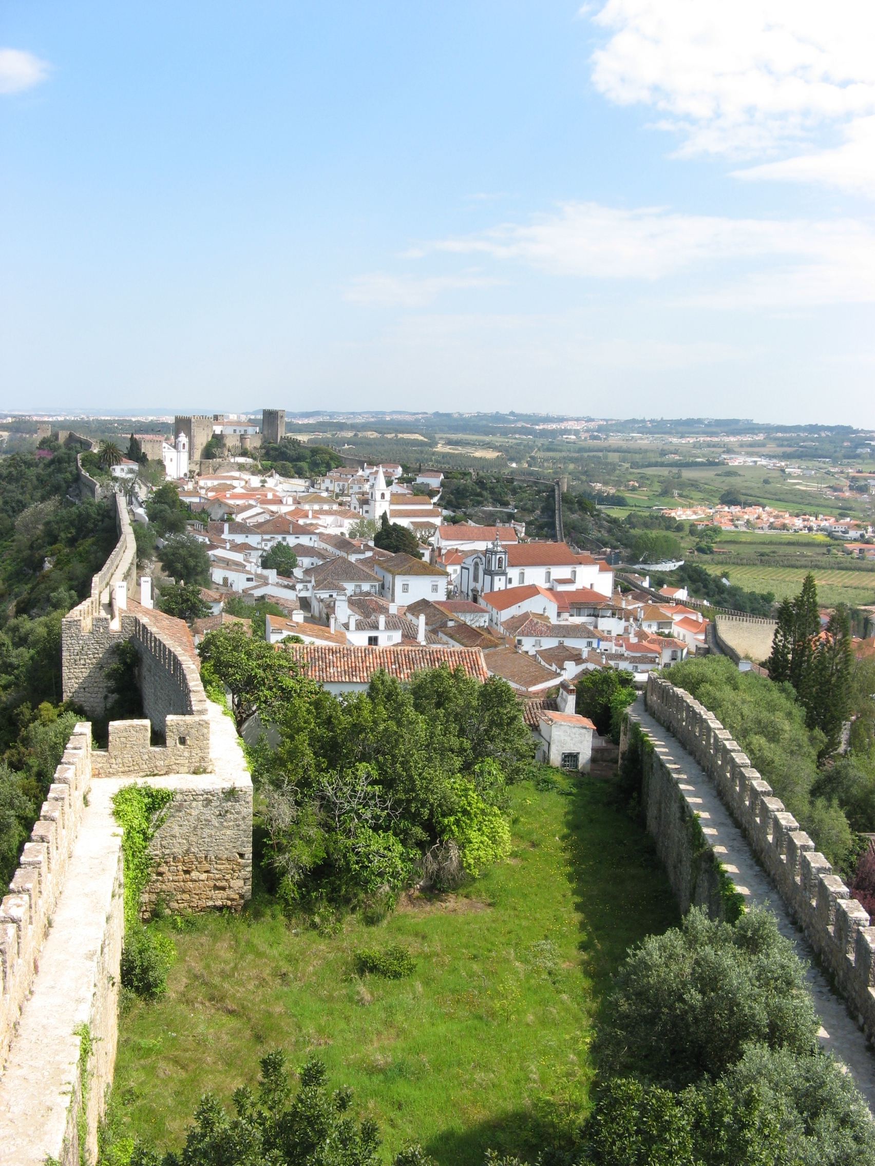 Obidus